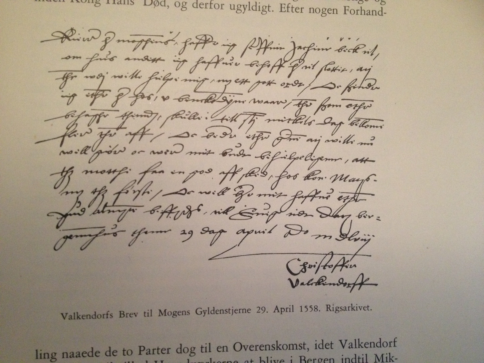 Christoper Walkendorffs brev till Mogens Gyldenstierne